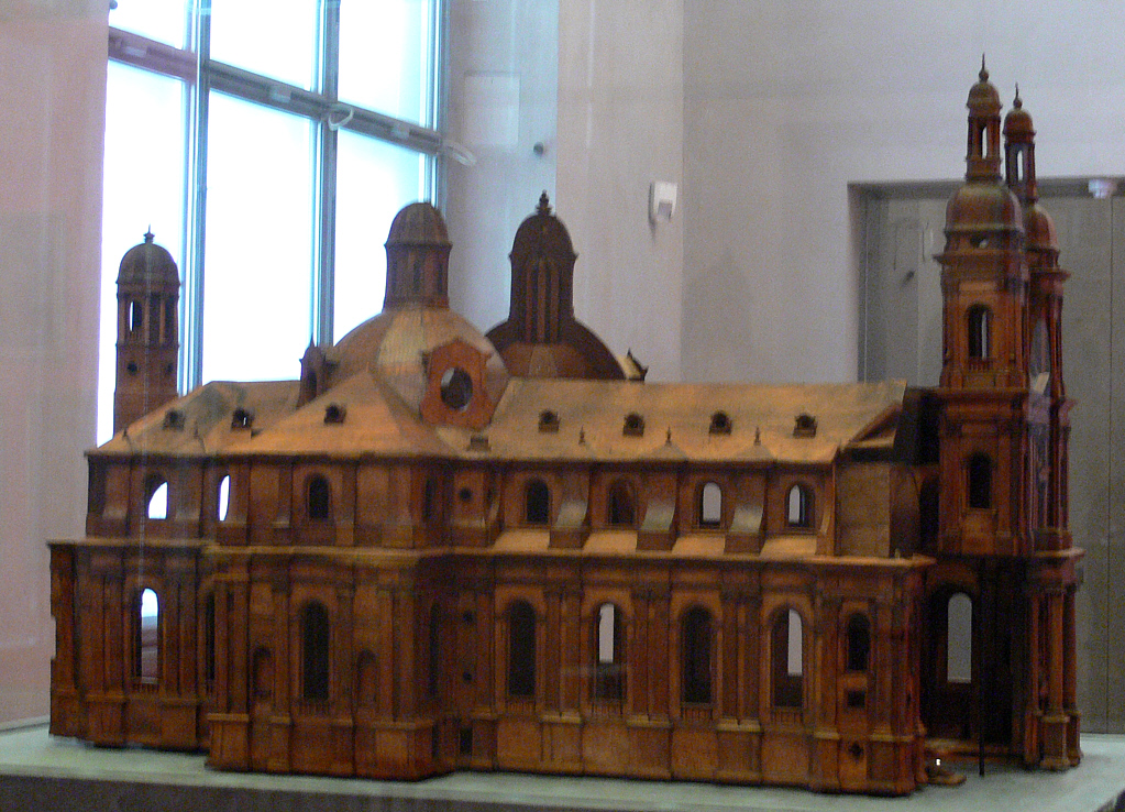 Modell der ehemaligen Klosterkirche Münsterschwarzach (abgebrochen im 19. Jahrhundert) nach Angaben von Balthasar Neumann, Würzburg 1726/1727; verschiedene Hölzer Bayerisches Nationalmuseum, München; Inv. Nr. Mod. 18